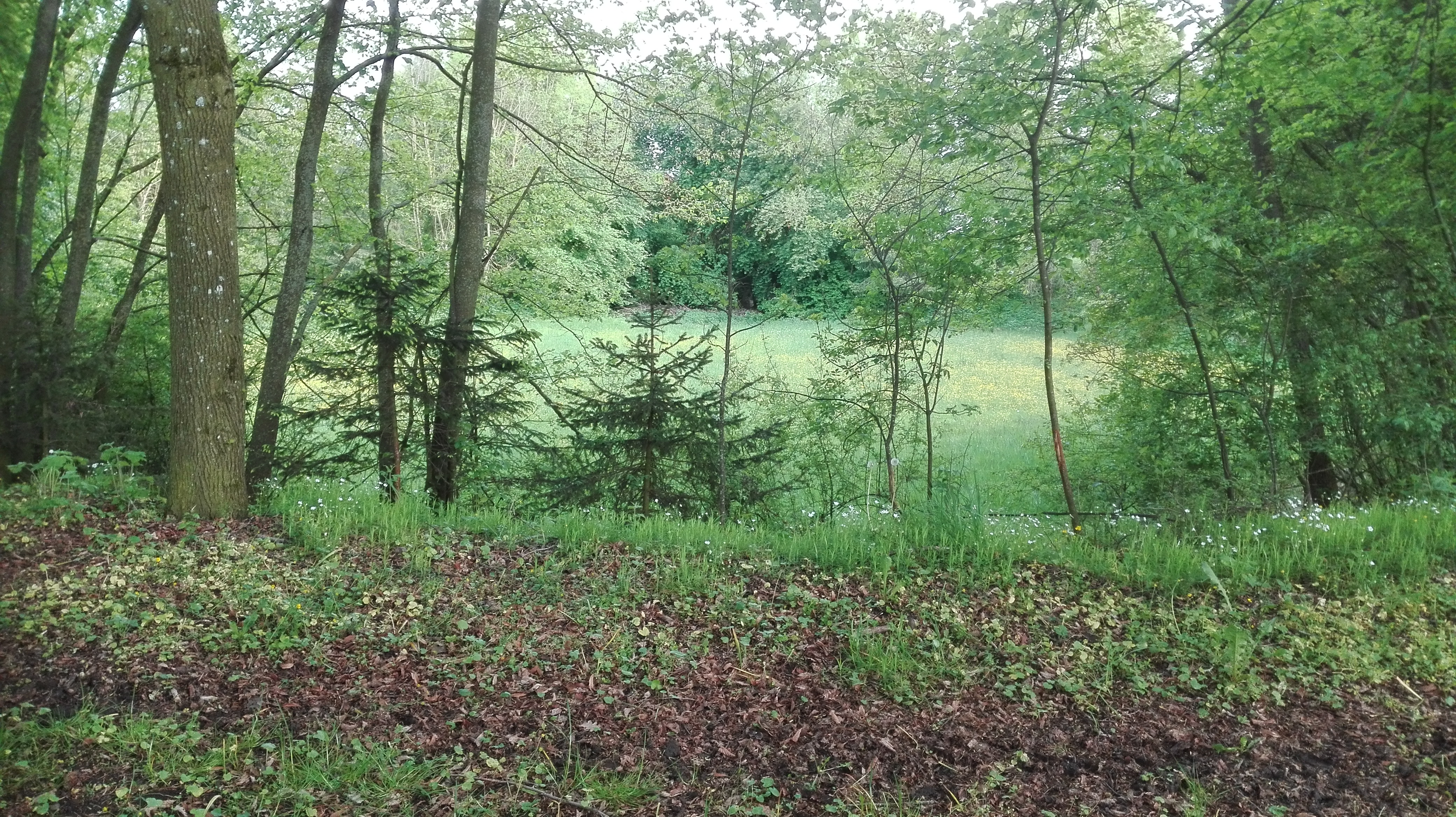 Wall und Mulde der ehemaligen Burg-/ Schlossanlage Lauffenbürg